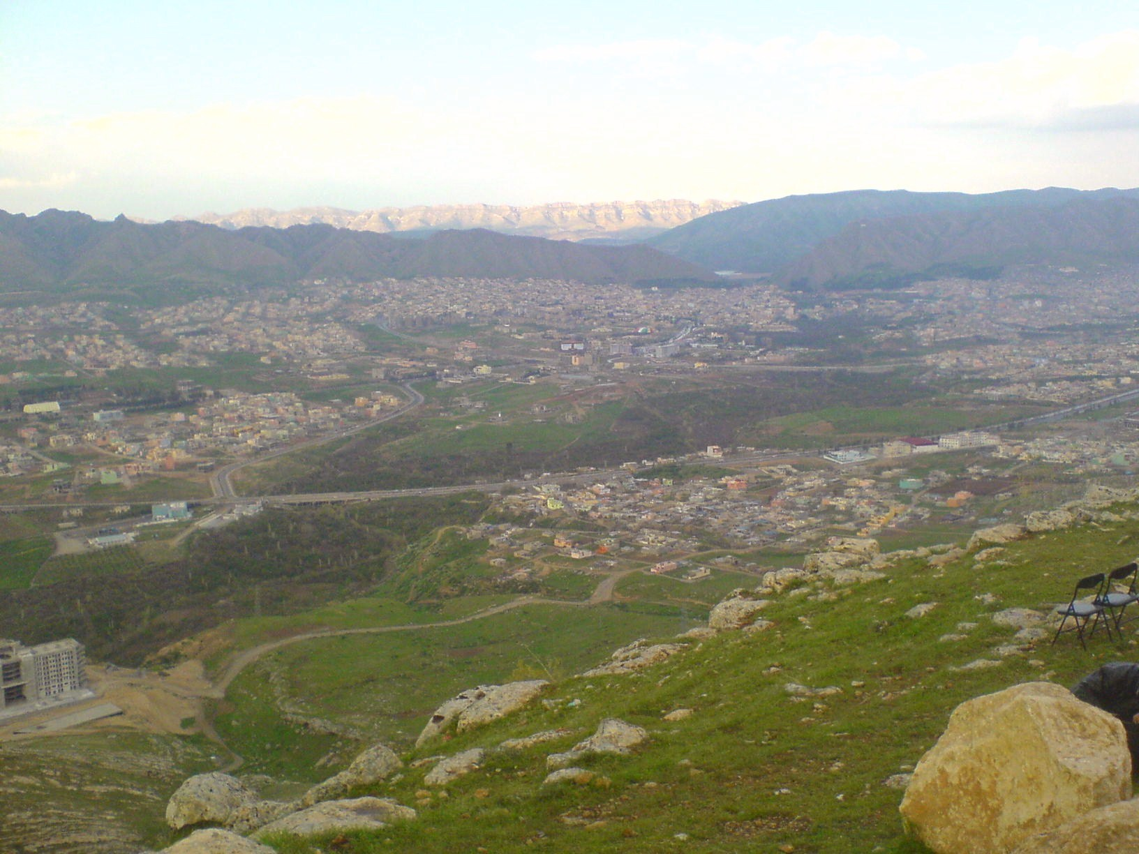 Duhok monten